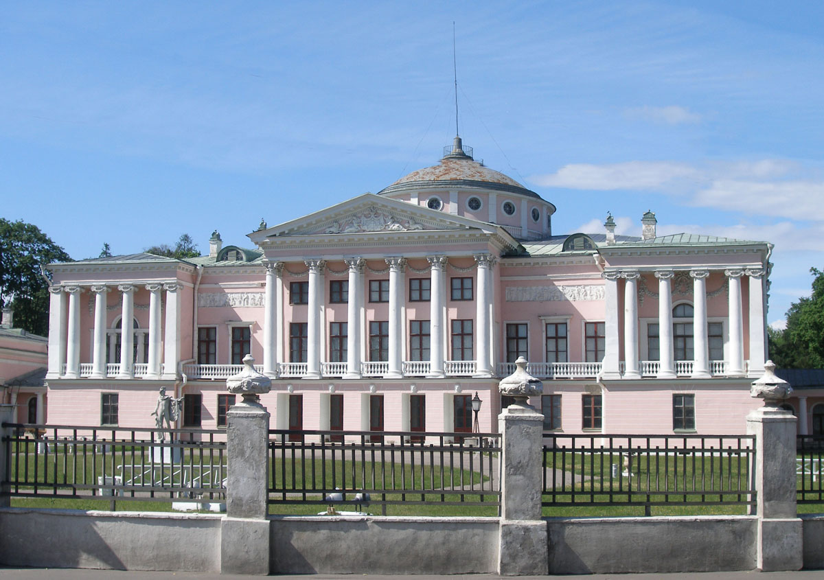 Усадьба останкино